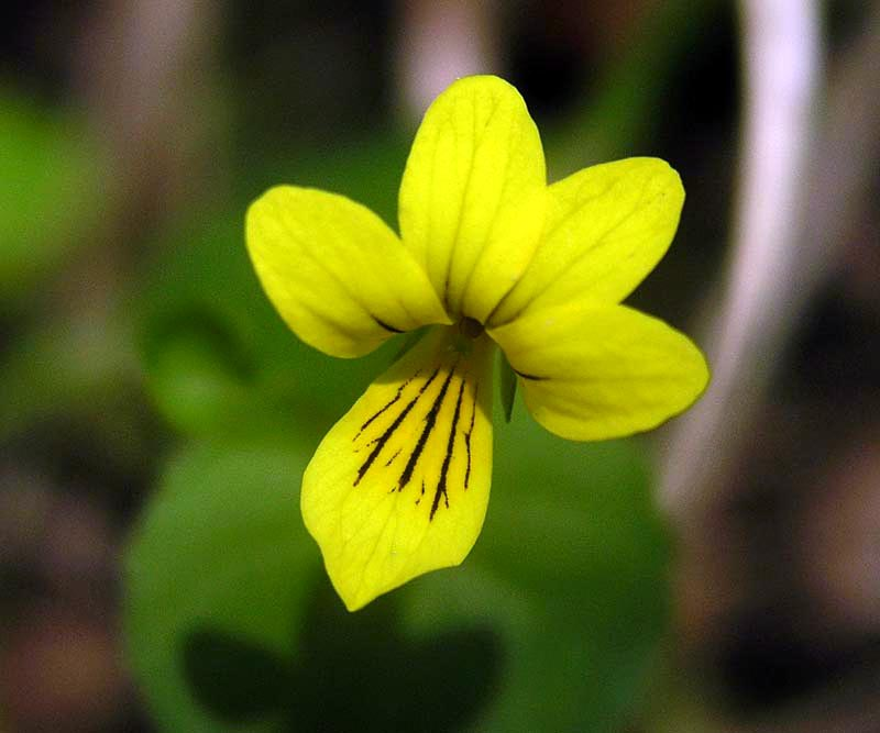 Zweiblütiges Veilchen (Viola biflora), aufgenommen im Bergwald in der Nähe von Einödsbach (Allgäuer Alpen)